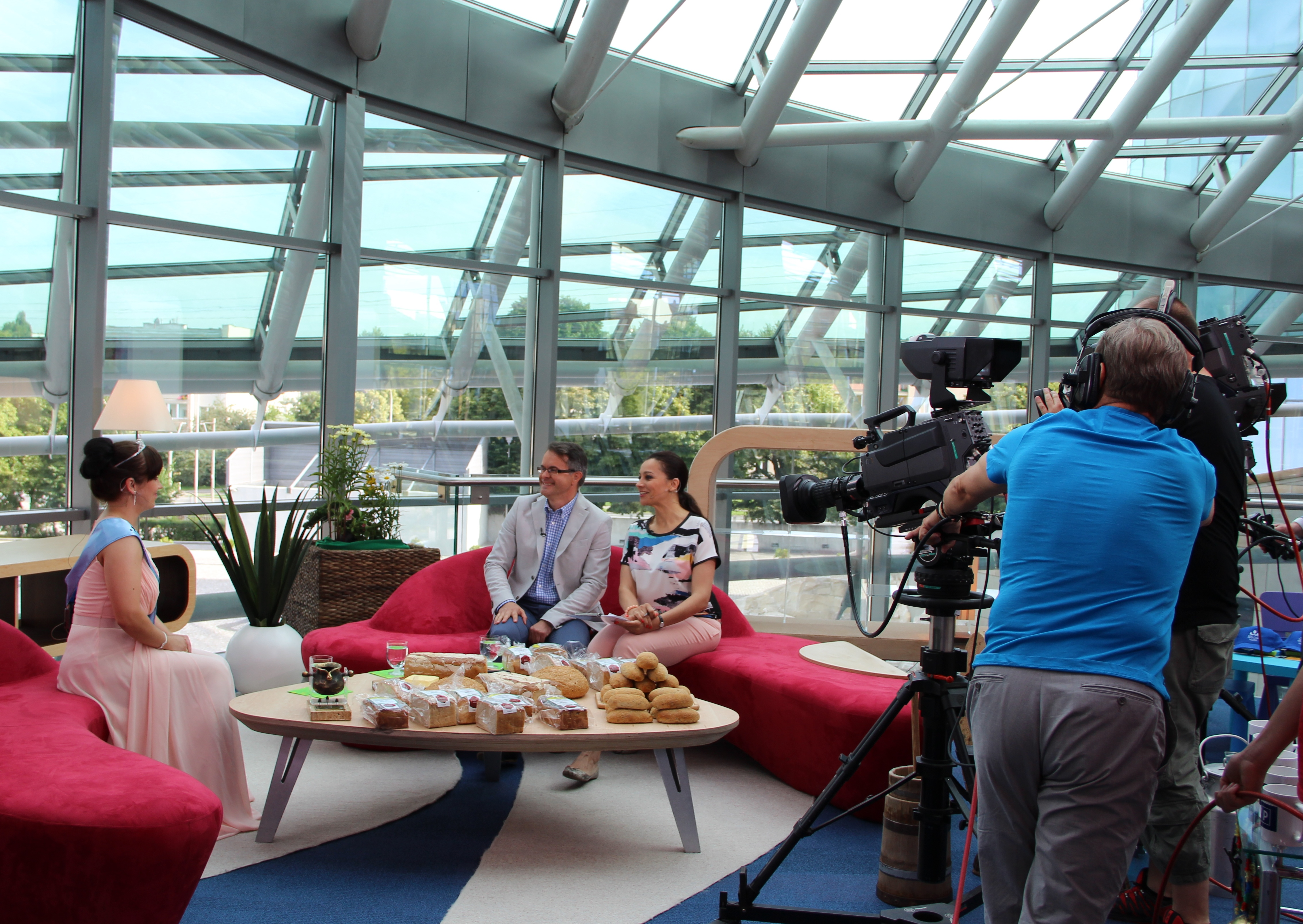 TVP 1, Dzień dobry w sobotę, 05.07.2014, Fernsehsendung mit Królowa Mleka, Katarzyna Gajownik.